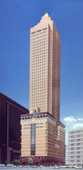 Torii_(Tokutosh)_Proyecto_de_un_rascacielos_para_Taipei_(Taiwan)_1986-87